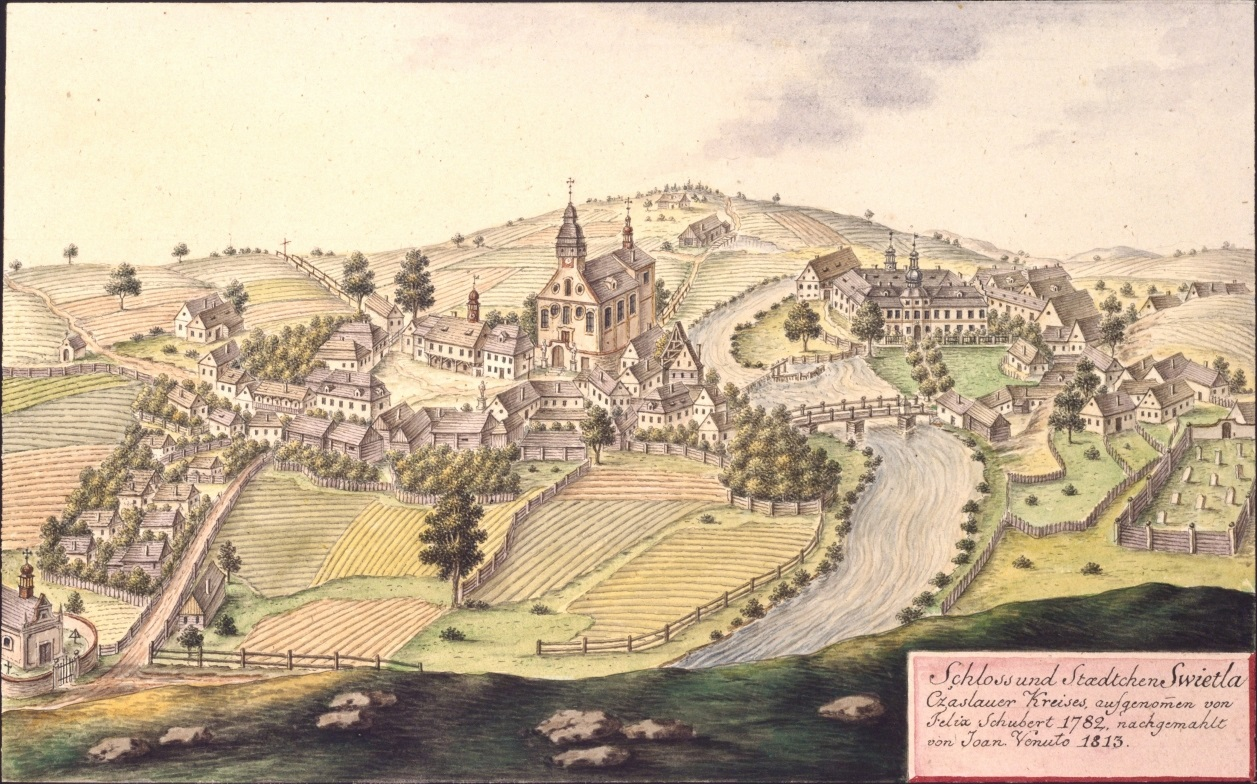 Zámek a městys Světlá nad Sázavou. Schloss und Staedtchen Swietla Cžaslauer Kreises, aufgenommen von Felix Schubert 1782, nachgemahlt von Joan. Venuto 1813